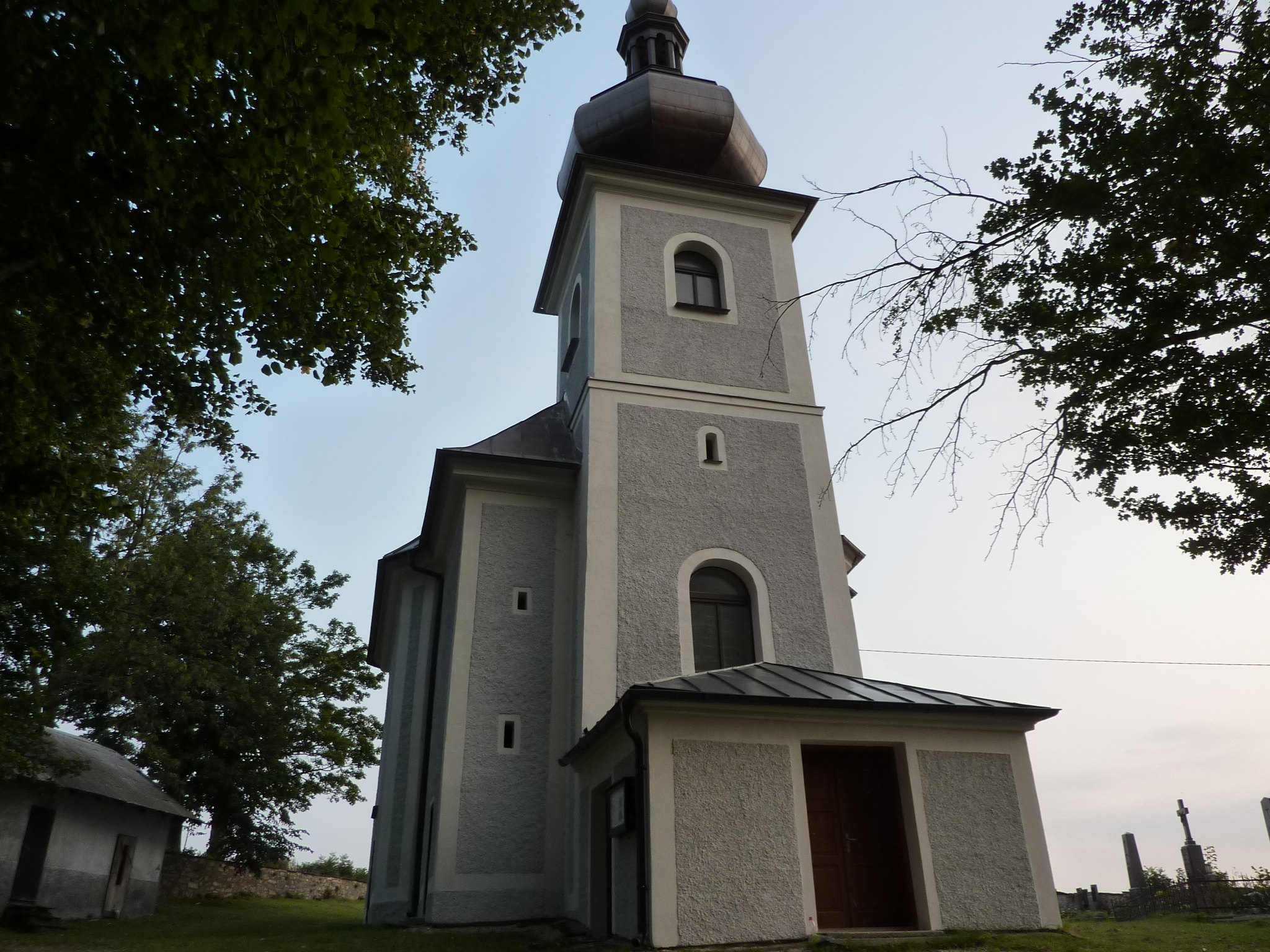 Kostel sv. Jiří (Dětřichov nad Bystřicí), nad obcí, Dětřichov nad Bystřicí